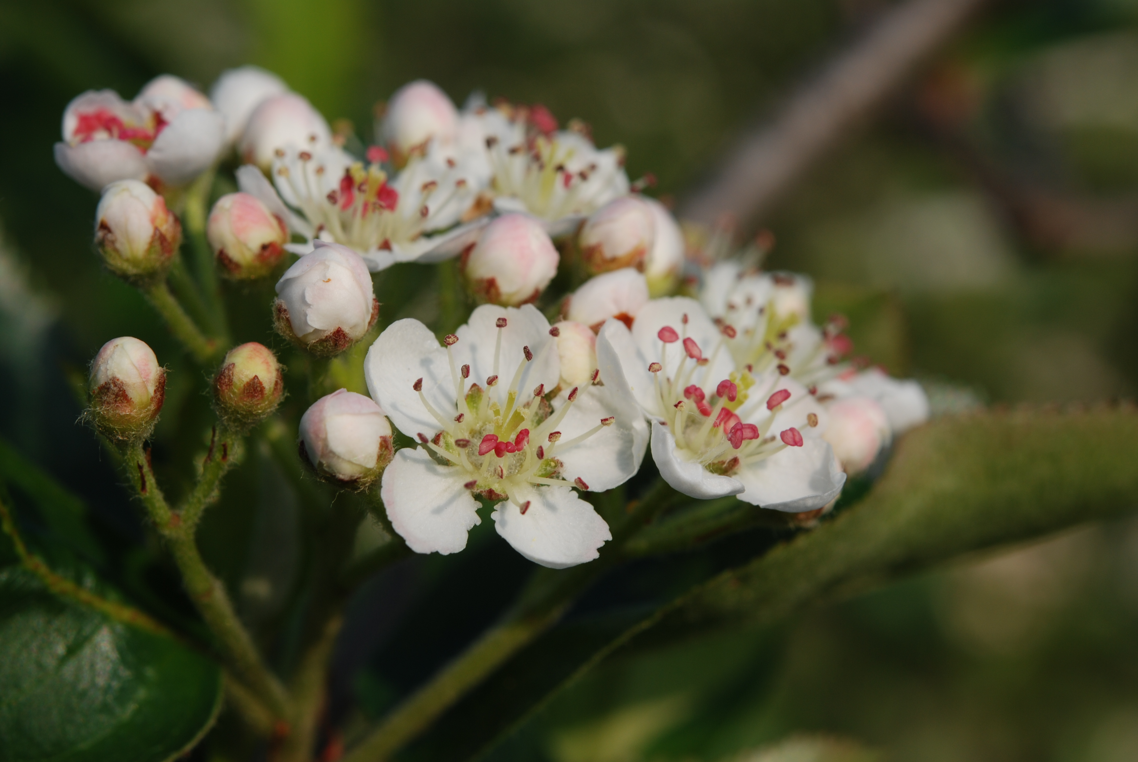 野櫻莓開花